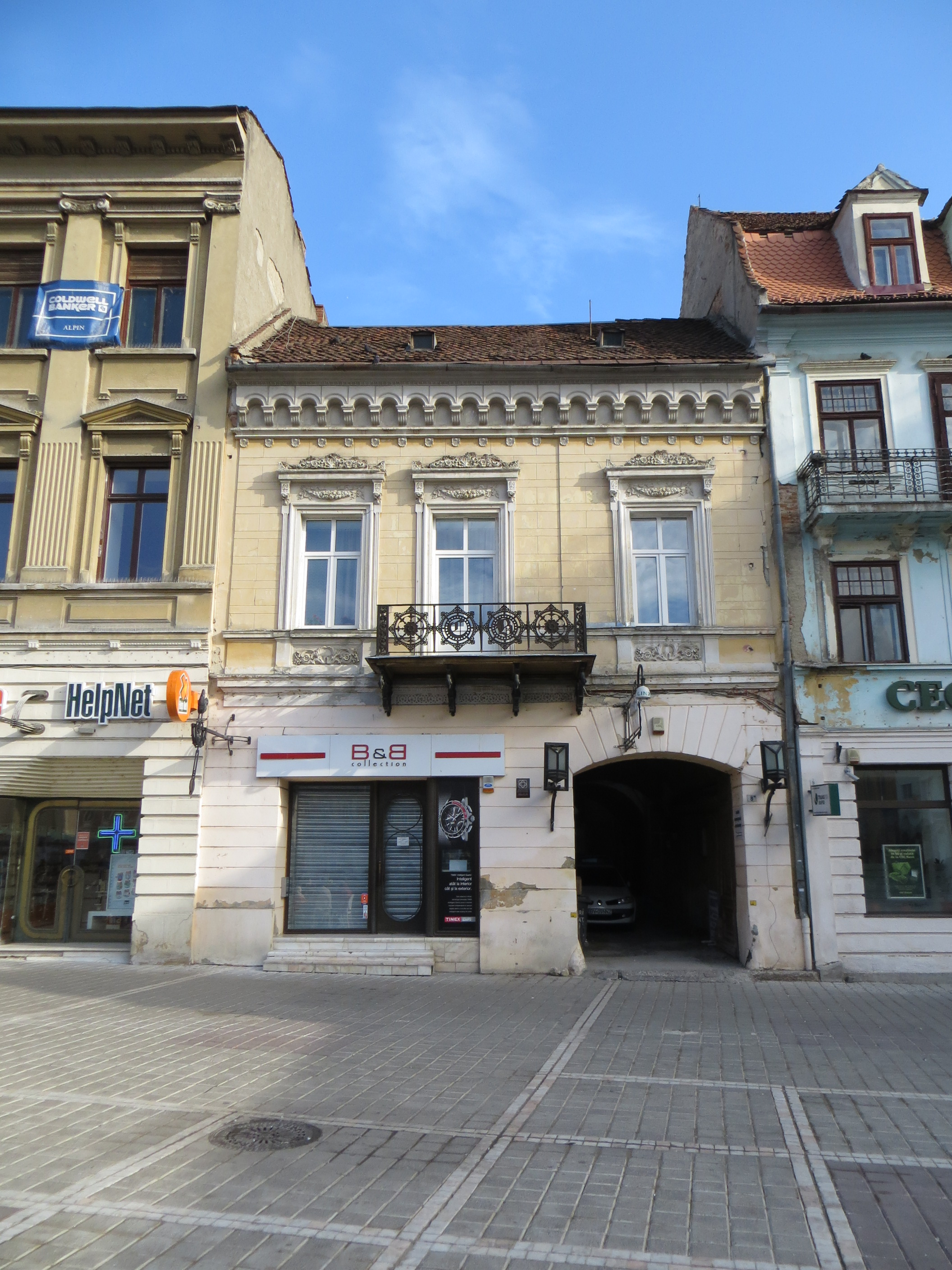 Casă din Piața Sfatului 8, Brașov